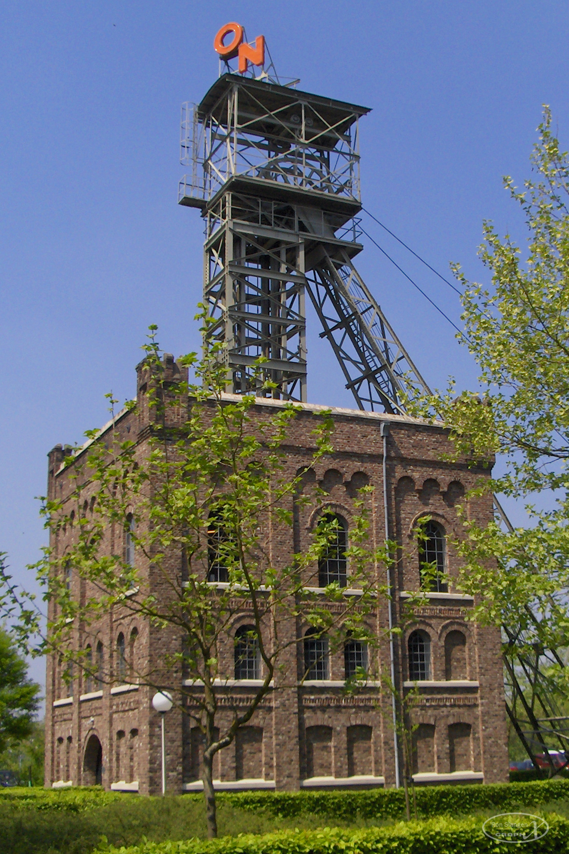 Foto gemaakt door: Ron Slangen